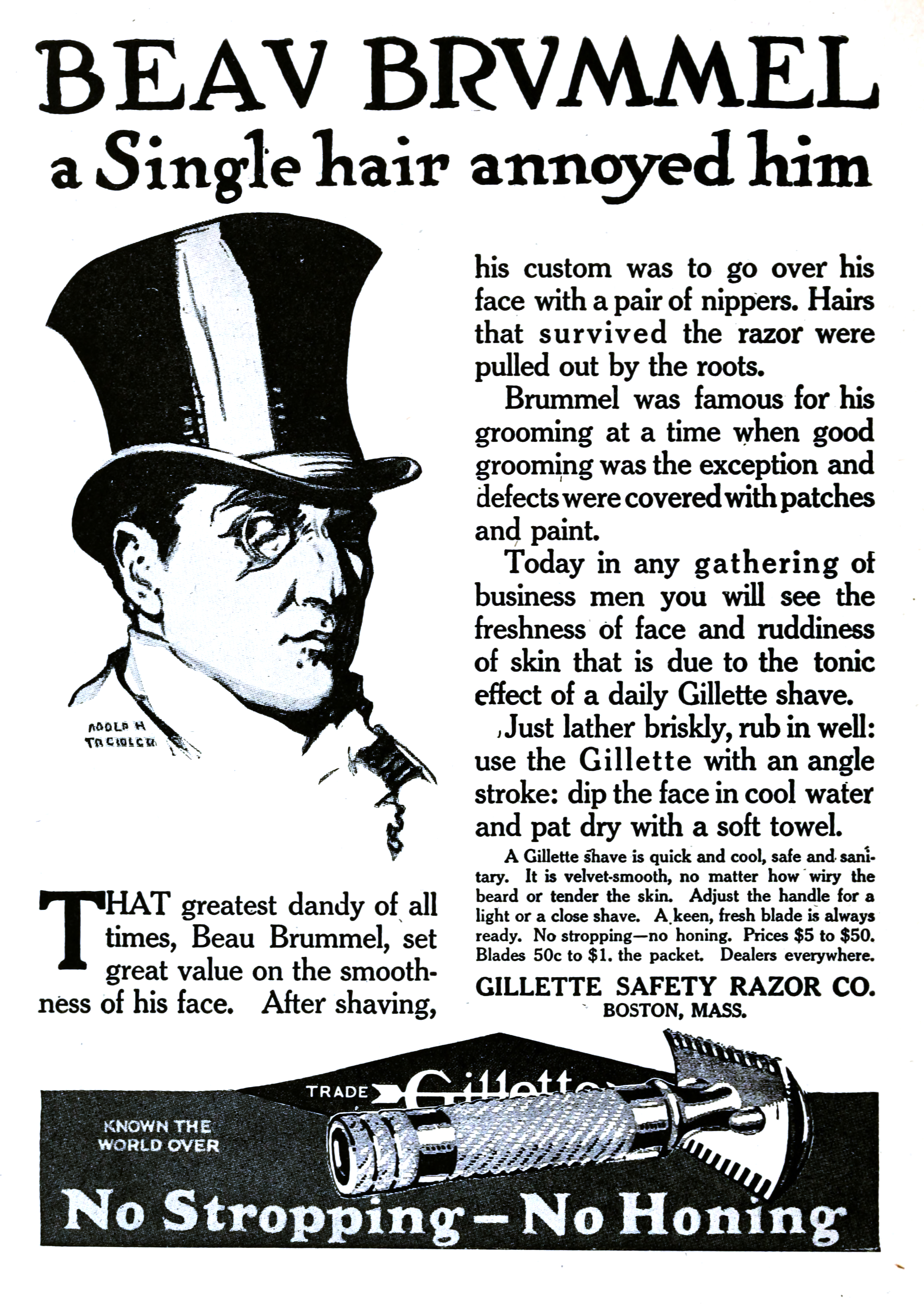 Gillette shaving blade advertisement featuring Beau Brummel